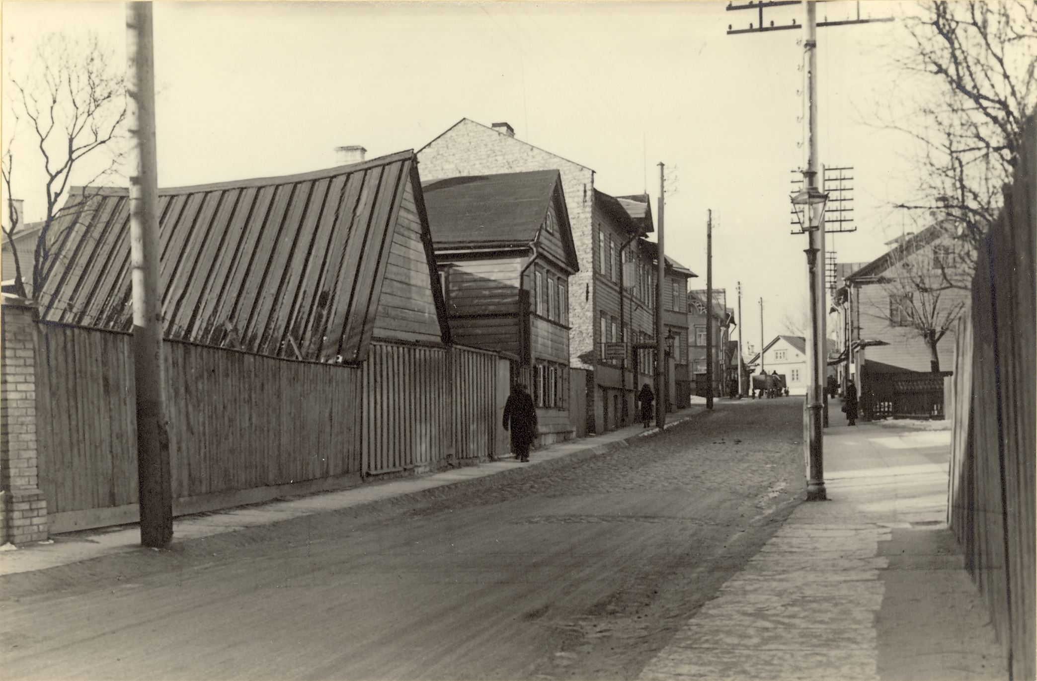 Liiva tn 16. Kinnistu nr 1200b, A. Grobe kinnisvara